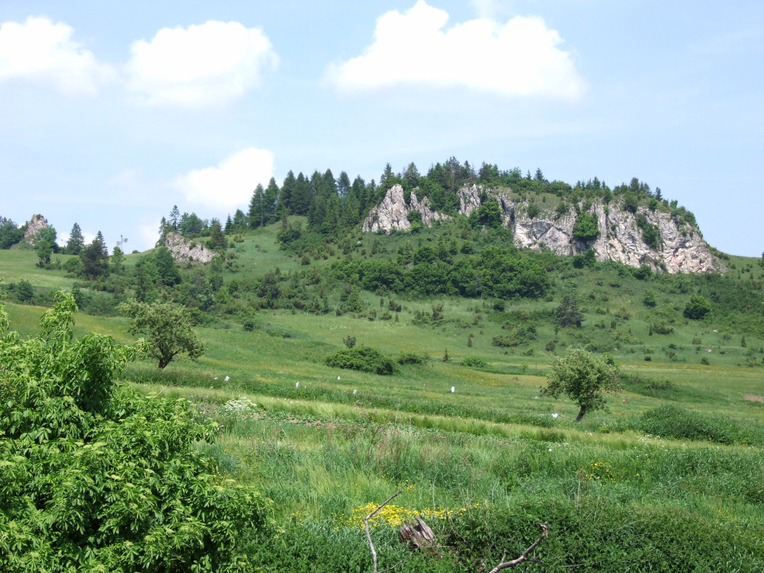 Litmanová. Skałki na wprost kościoła